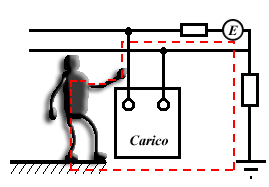 autore: Len zuò descrizione: schema esemplificativo di un condatto diretto